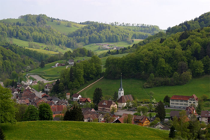 Langenbruck